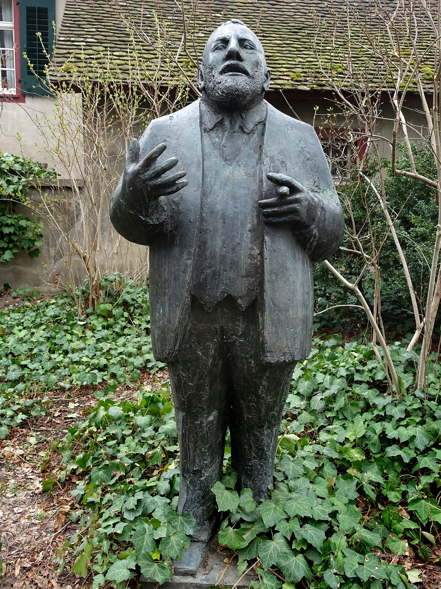 Skulptur, Dr. Rudolf Riggenbach (1882–1961) Denkmalpfleger, auf dem Leonhardskirchplatz in Basel, Standort: 47° 33′ 19,84″ N, 7° 35′ 16,67″ E